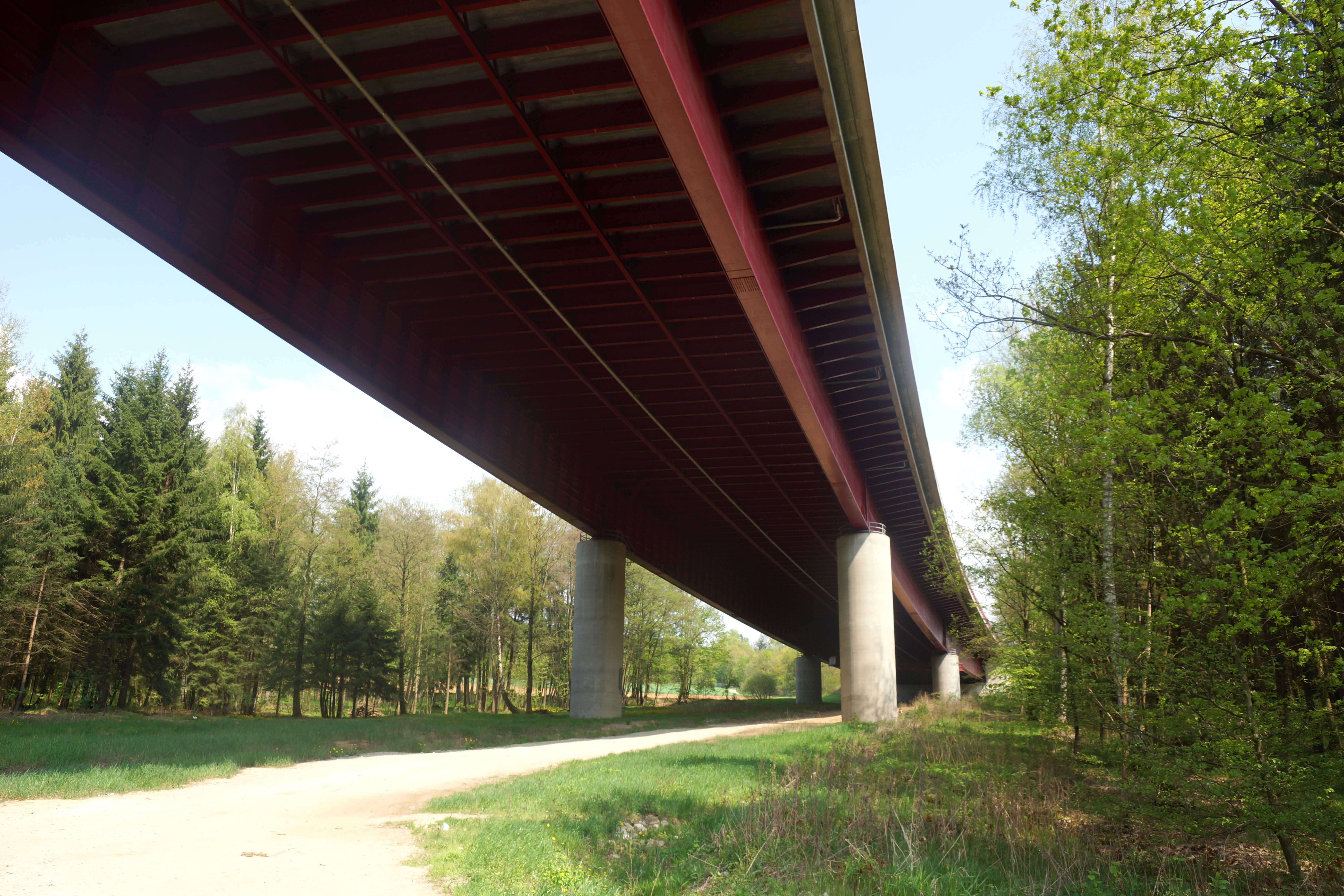 Die Autobahnbrücke der A3 über das Oberpfälzer Pilsachtal